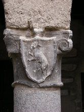 Stemma della nobile famiglia Bossi su una colonna della chiesa di Santa Maria Assunta in Daverio.